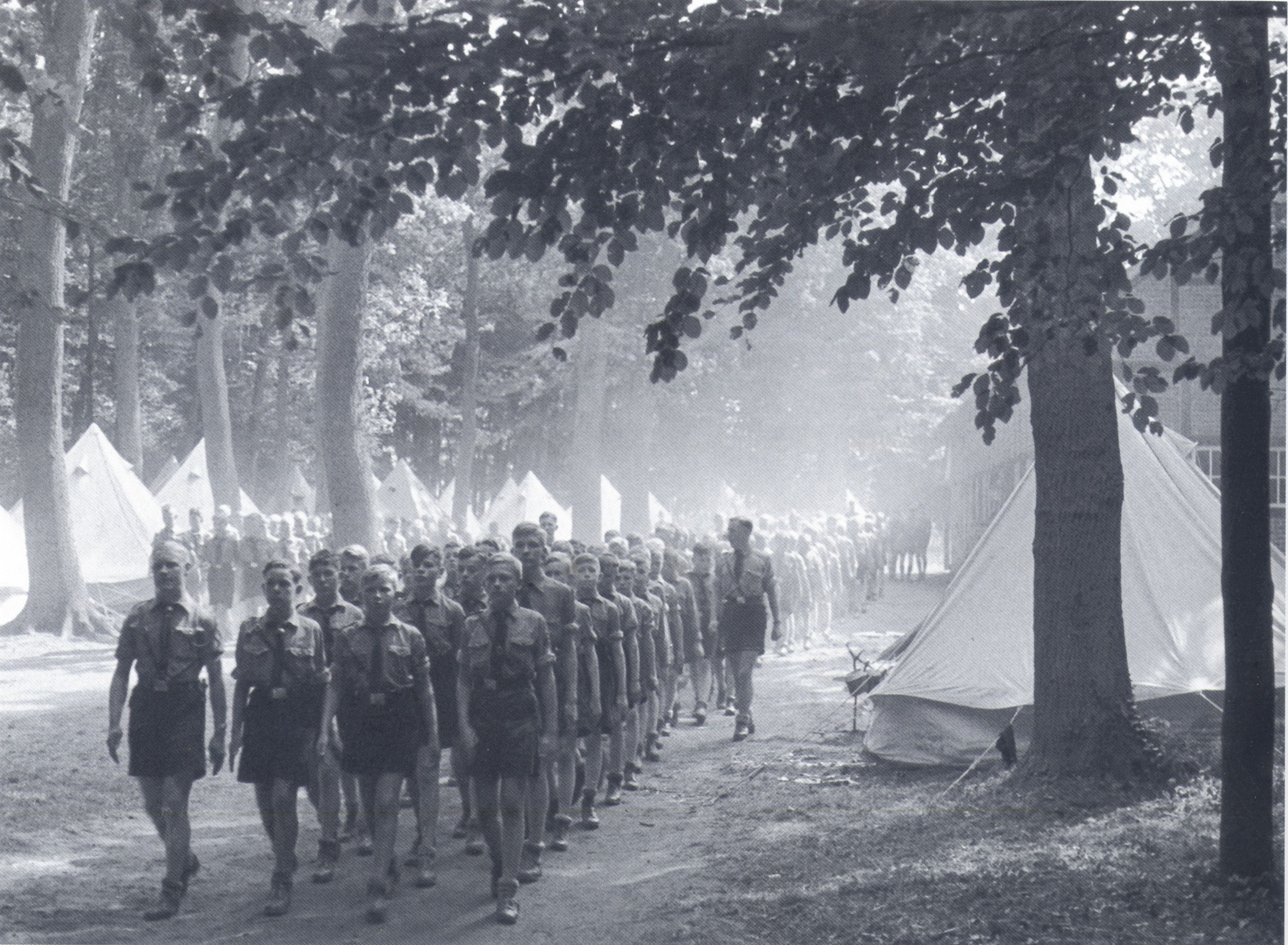 HJ Aufmarsch